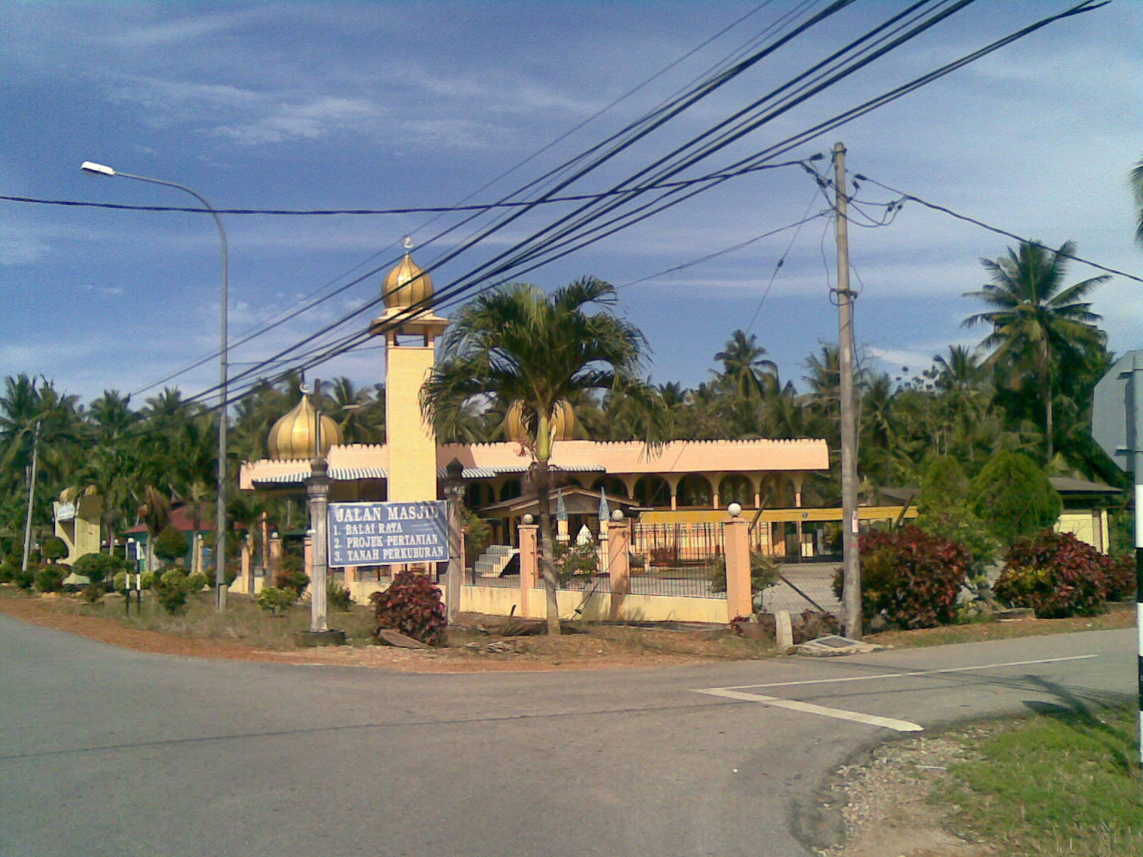 Masjid Kg Sungai Tengar Sabak Bernam Selangor pada 08 Desember 2007